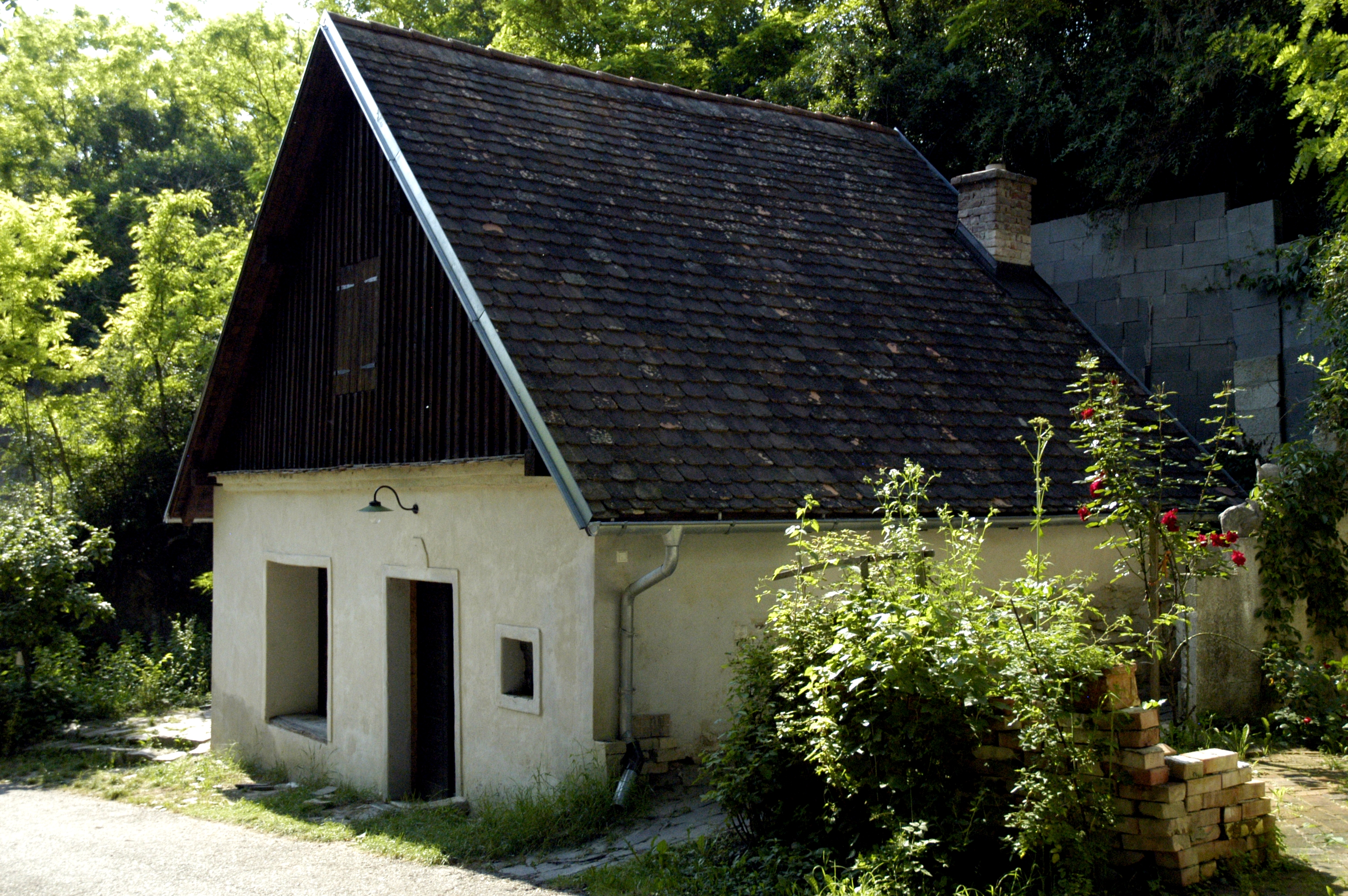 Keller Baxant-Cejnar ehem. Mehofer in der Mühlbergkellergasse in Sitzendorf an der Schmida